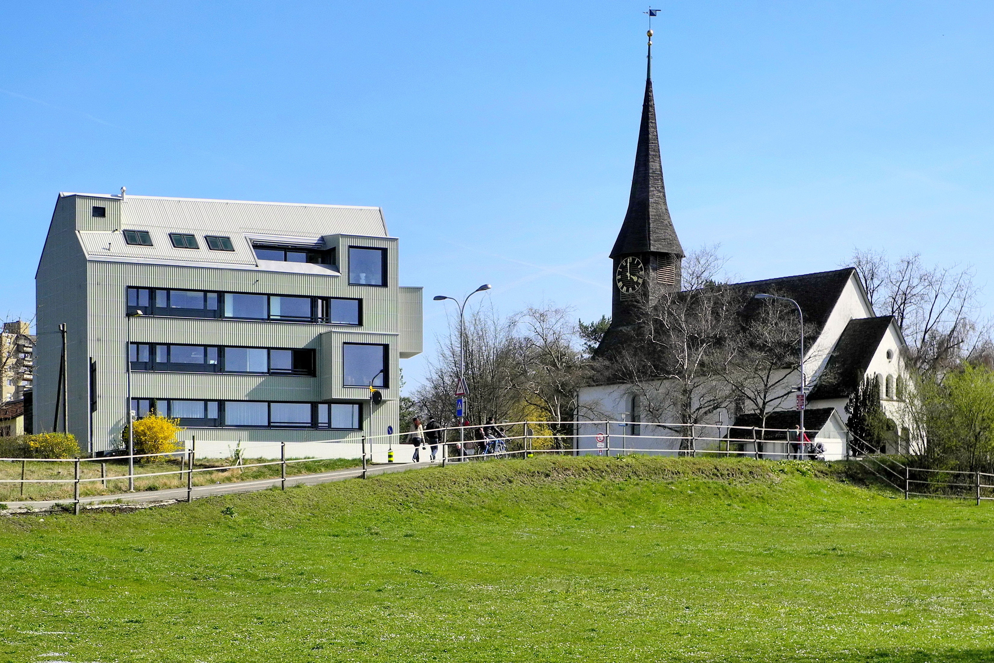 Reformierte Kirche in Zürich-Unteraffoltern (Switzerland)